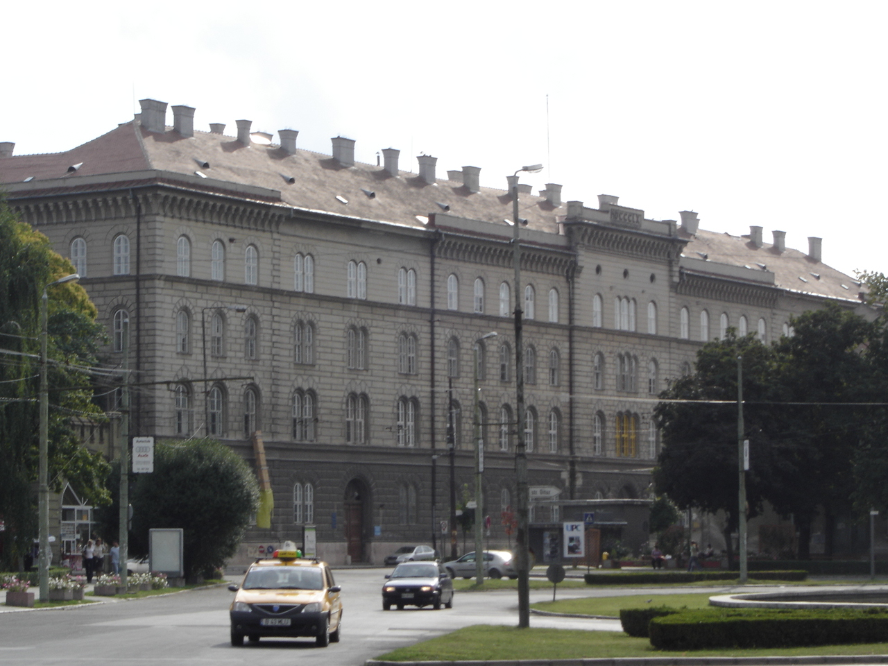 Dikasterialpalast Timişoara